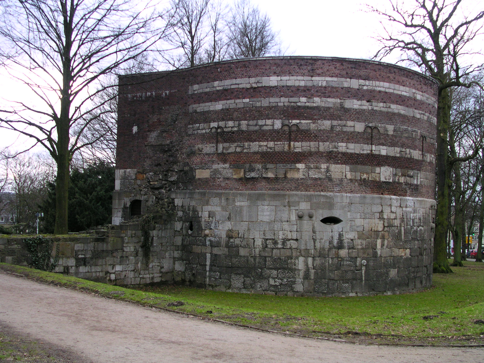 Aachen, Ehrenmal